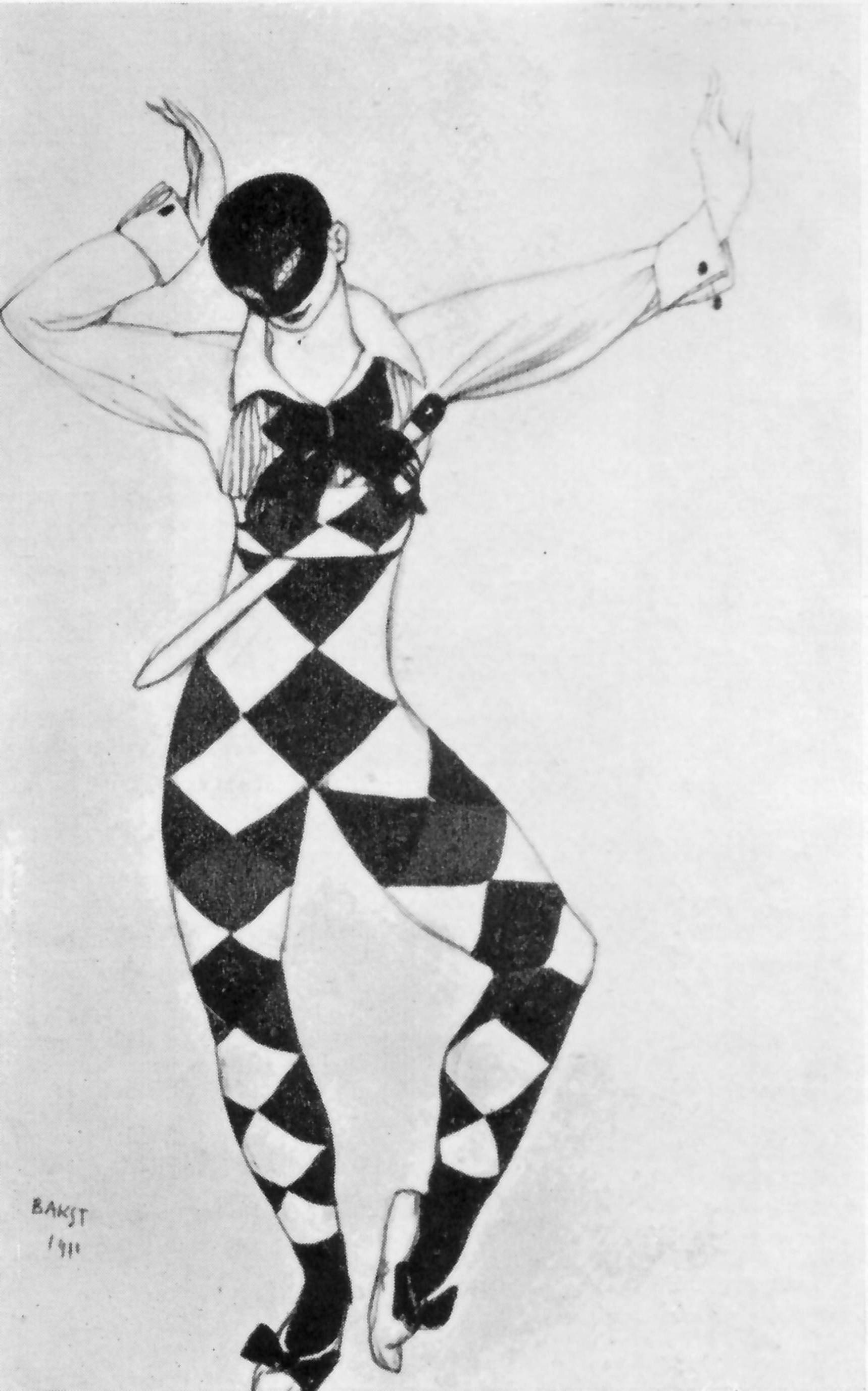 The design is for Mikhail Fokine's ballet Carnaval. Эскиз костюма Арлекина для "Карнавала" Шумана. 1910.